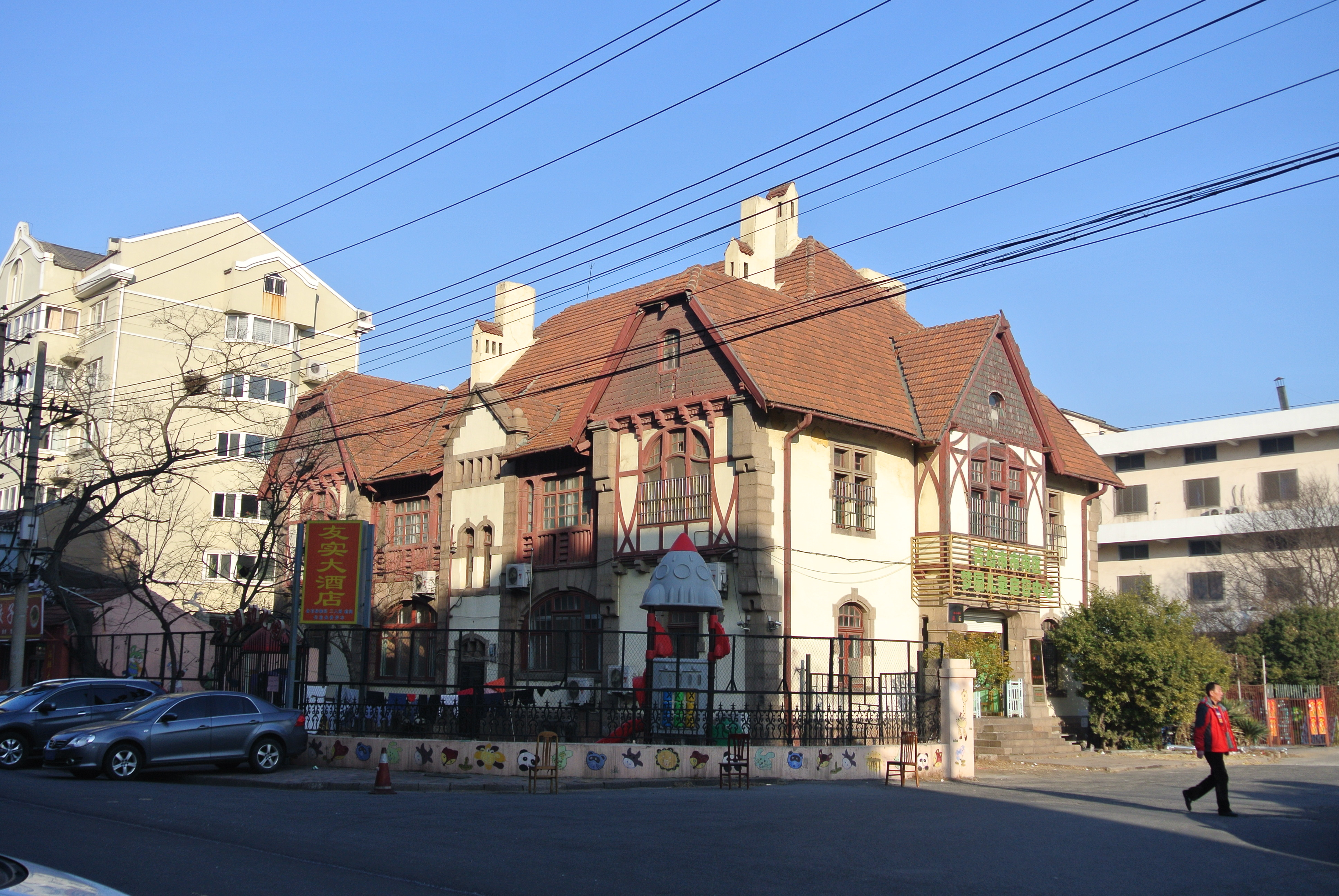 青岛督署屠宰场办公楼旧址